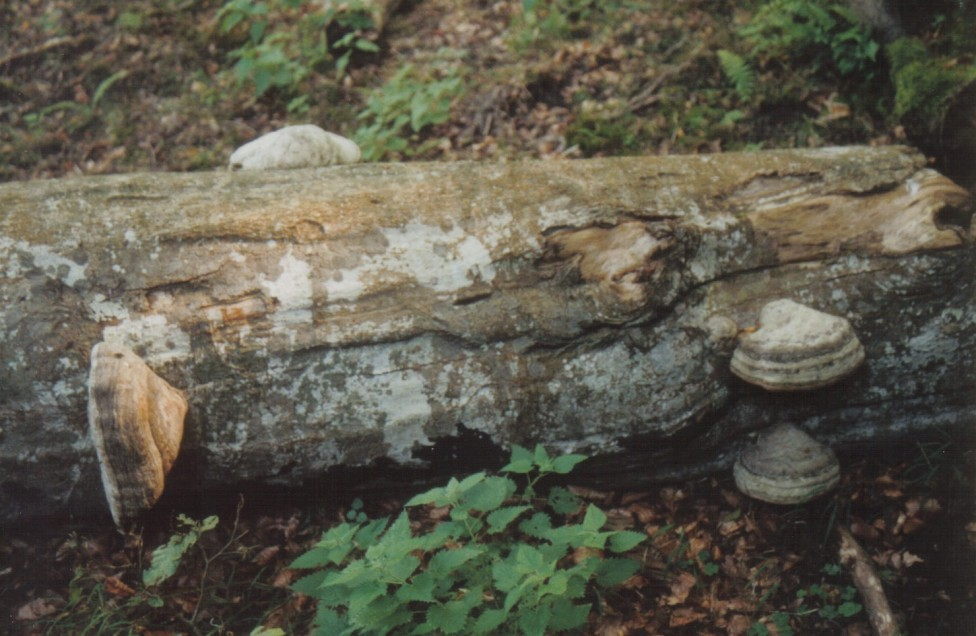 selbstfotografiert, GFDL